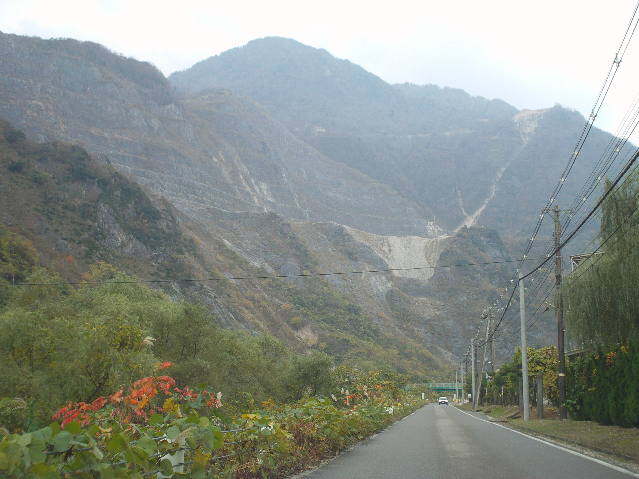 新潟県糸魚川市の黒姫山